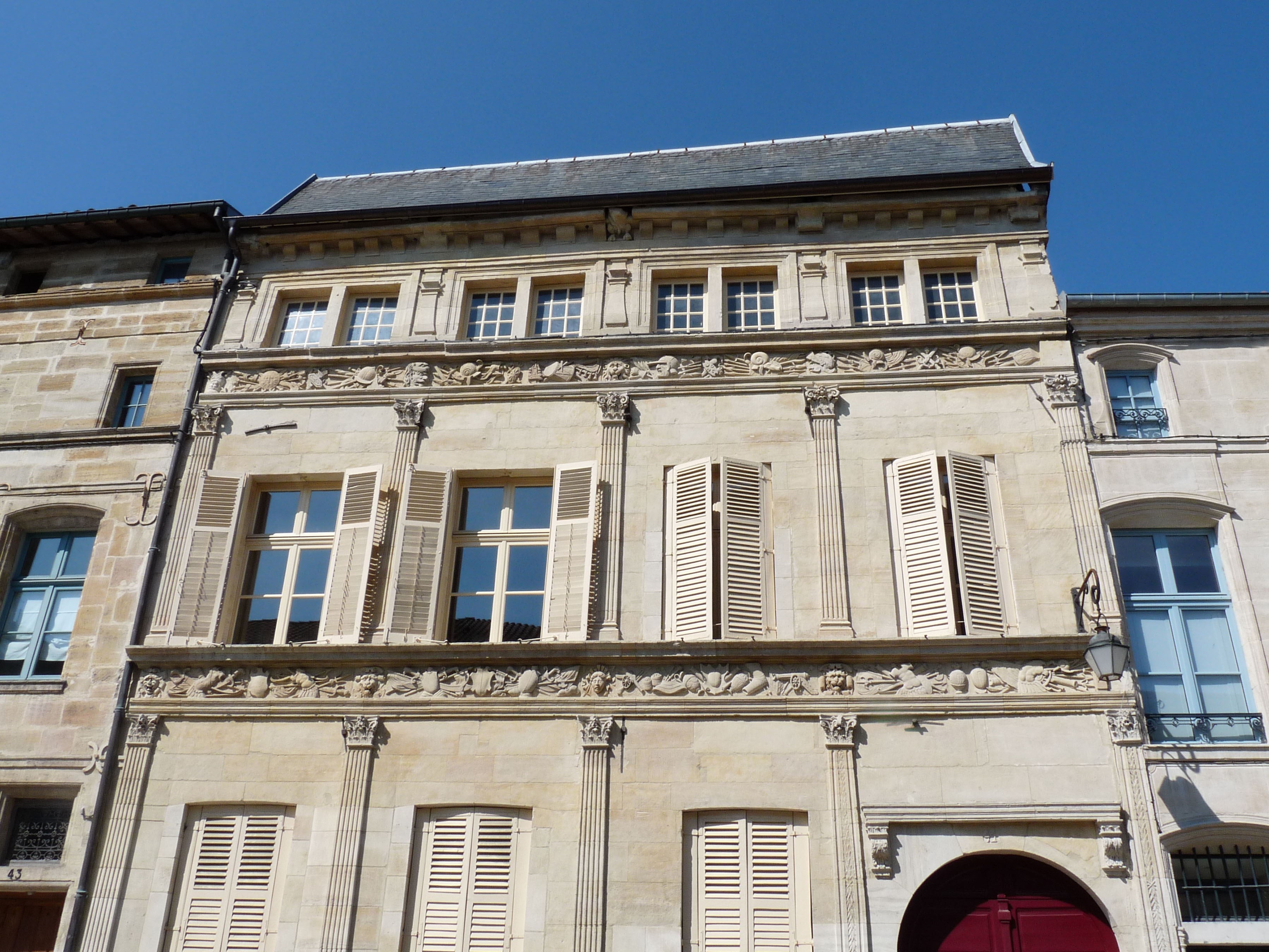 Hôtel de l'Escale : immeuble de Bar-le-Duc (Meuse), au n° 41 de la rue des Ducs-de-Bar. Quartier Renaissance de la Ville Haute. Classé par les Monuments historiques en 1992.